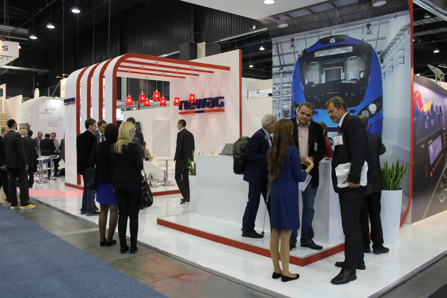 Stoisko Newagu podczas targów Trako 2015. The making of this document was supported by Wikimedia Polska Association, within Wikigrant no. WG 2015-34.